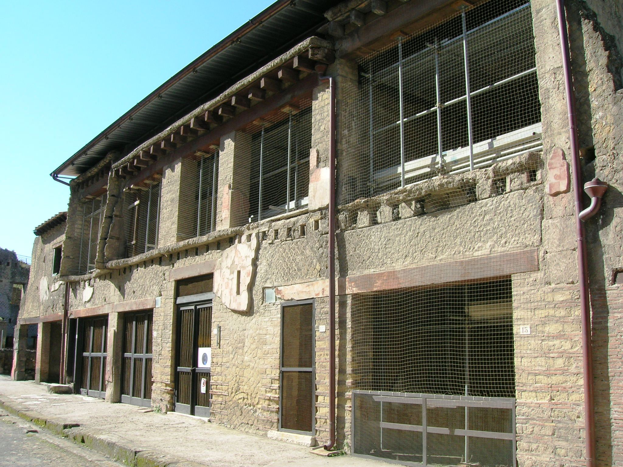 Casa del Bicentenario